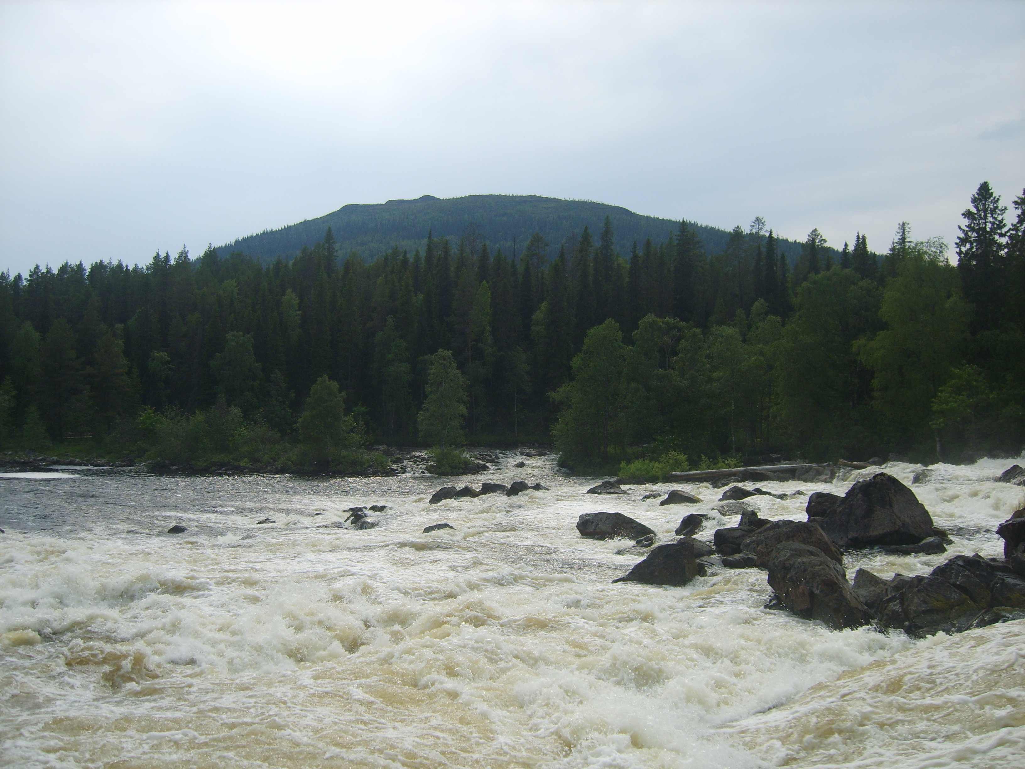 Вид на гору Кивакка с водопада Киваккакоски (река Оуланкайоки, также Оуланка-йоки, Оуланкаёки, Оуланка, Оланка). Паанаярви (национальный парк).